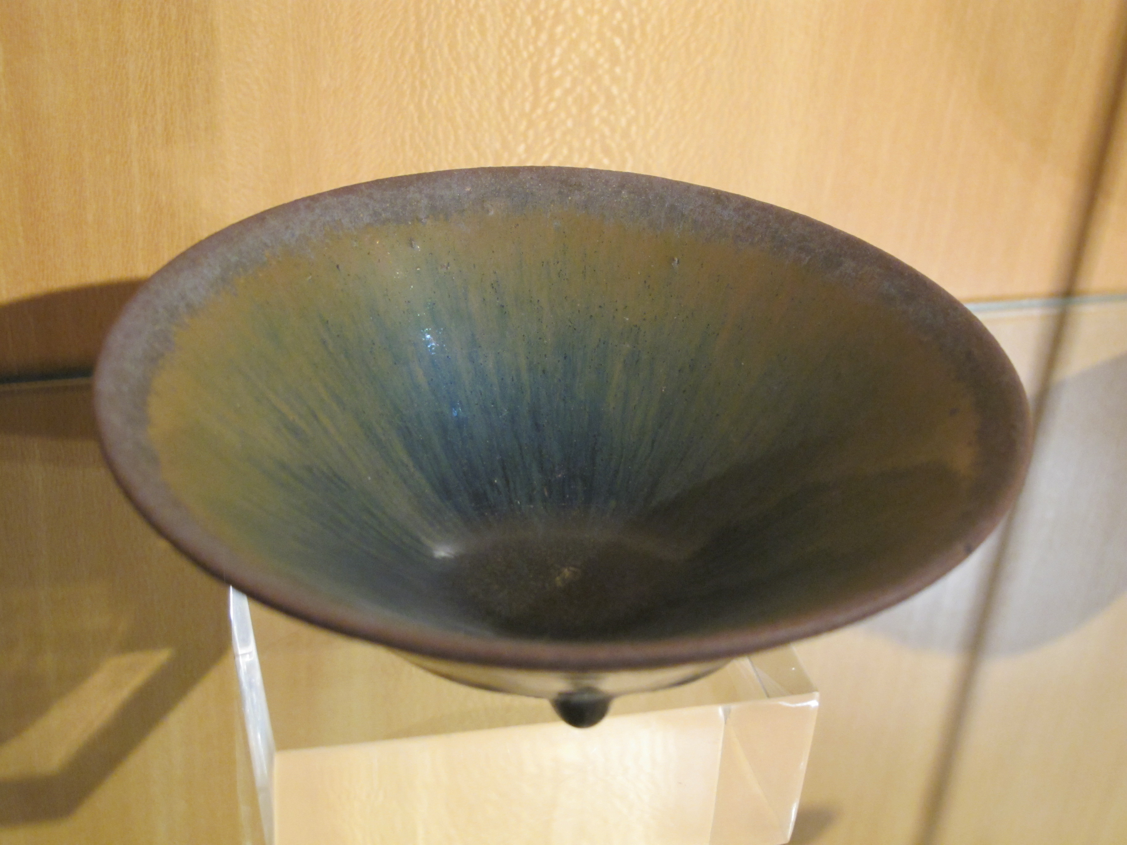 Bol à thé. Grès à couverte brune dite "fourrure de lièvre". H 4,5 cm, diam. ouv. 11,5 cm. Dynastie des Song du Sud (1127-1279). Bol utilisé par les moines chan des monts Tianmu (Tianmu shan), près de Hangzhou, au XIIIe siècle, et emporté au Japon par les moines japonais dans leurs bagages en tant que partie de leur enseignement. Connus sous le nom japonais de temmoku (aussi orthographié tenmoku). Musée Labit, Toulouse, France. Inventaire 71 8 3